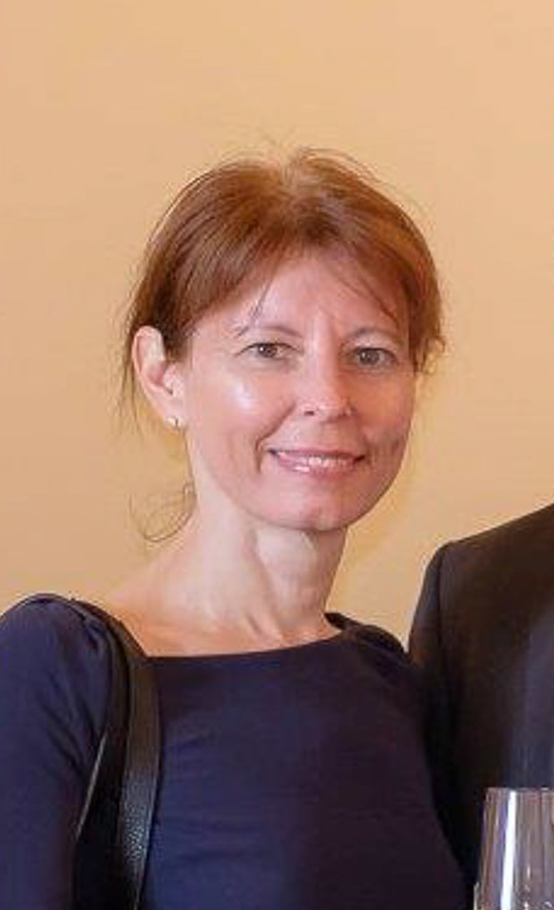 Bezirkshauptfrau Mag. Verena Sonnleitner,Landtagspräsident Karl Wilfing, Bgm. Dipl.-Ing. Stefan Szirucsek, Kultur-StR Hans Hornyik bei der Eröffnung der Baden Zentrum der Macht 1917-1918 im Kaiserhaus Baden